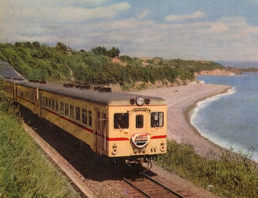 海岸を走るキハ55系「きのくに」